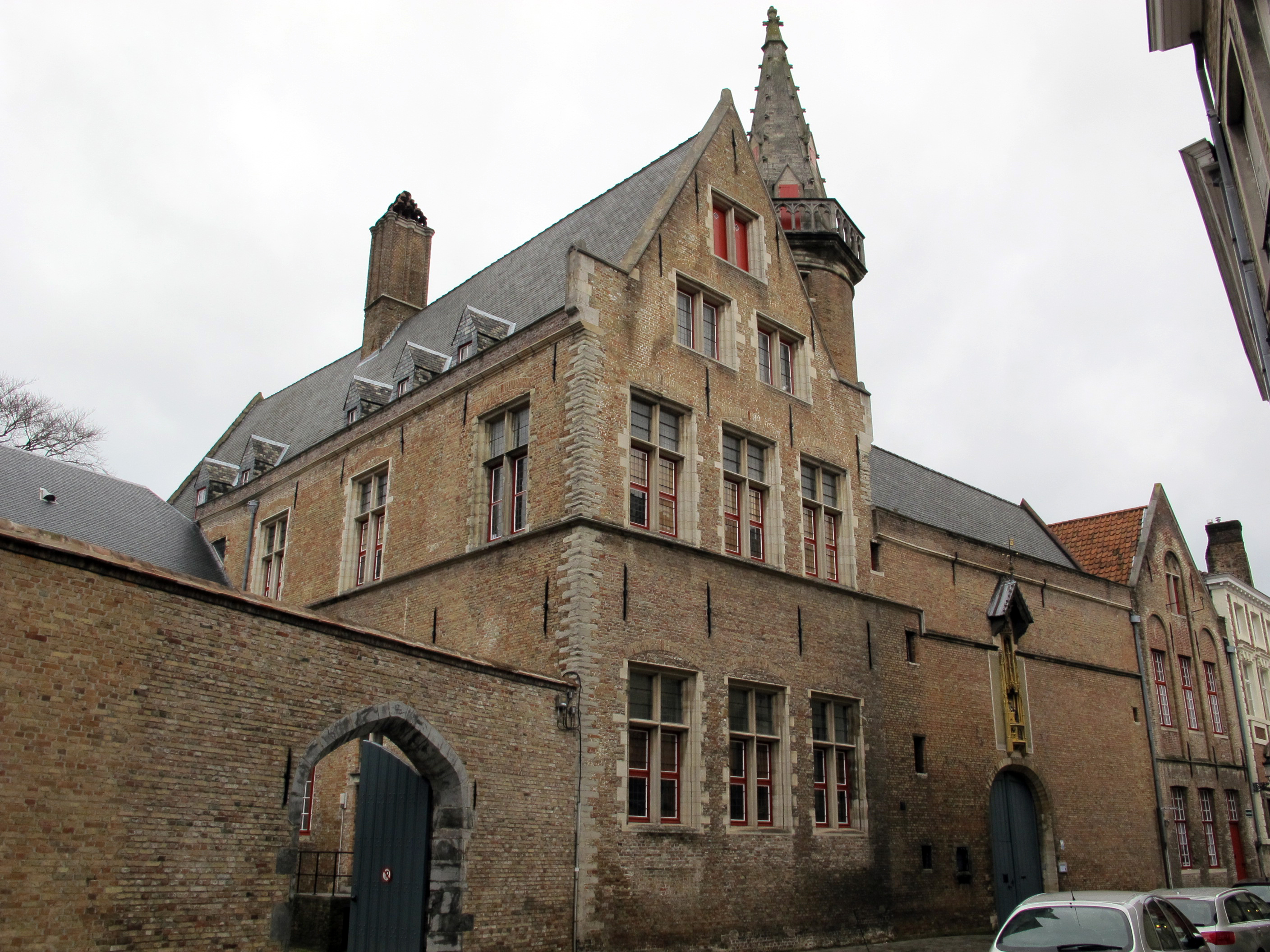 Bruges, hof bladelin, ex-sede del banco medici